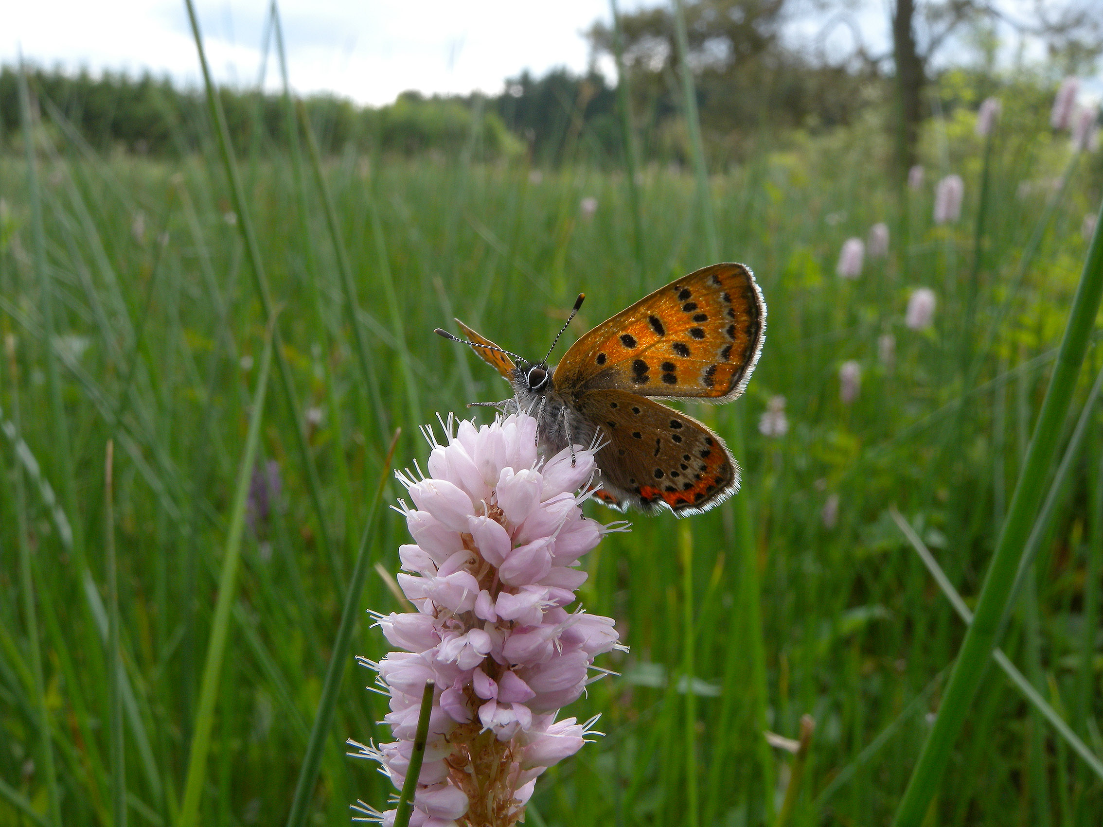 Blauschillernder Feuerfalter (Lycaena helle), Braunlauf, Ostbelgien